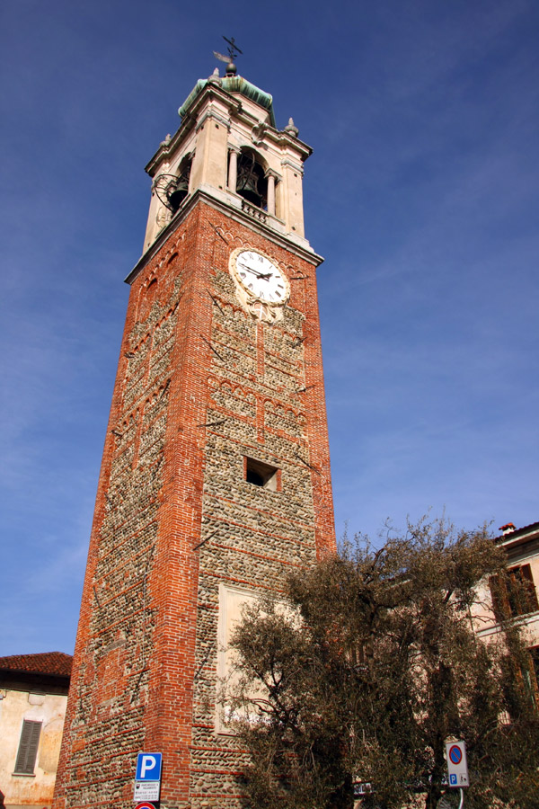 Torre Campanaria o Torre dei Bagliotti, Oleggio (NO)